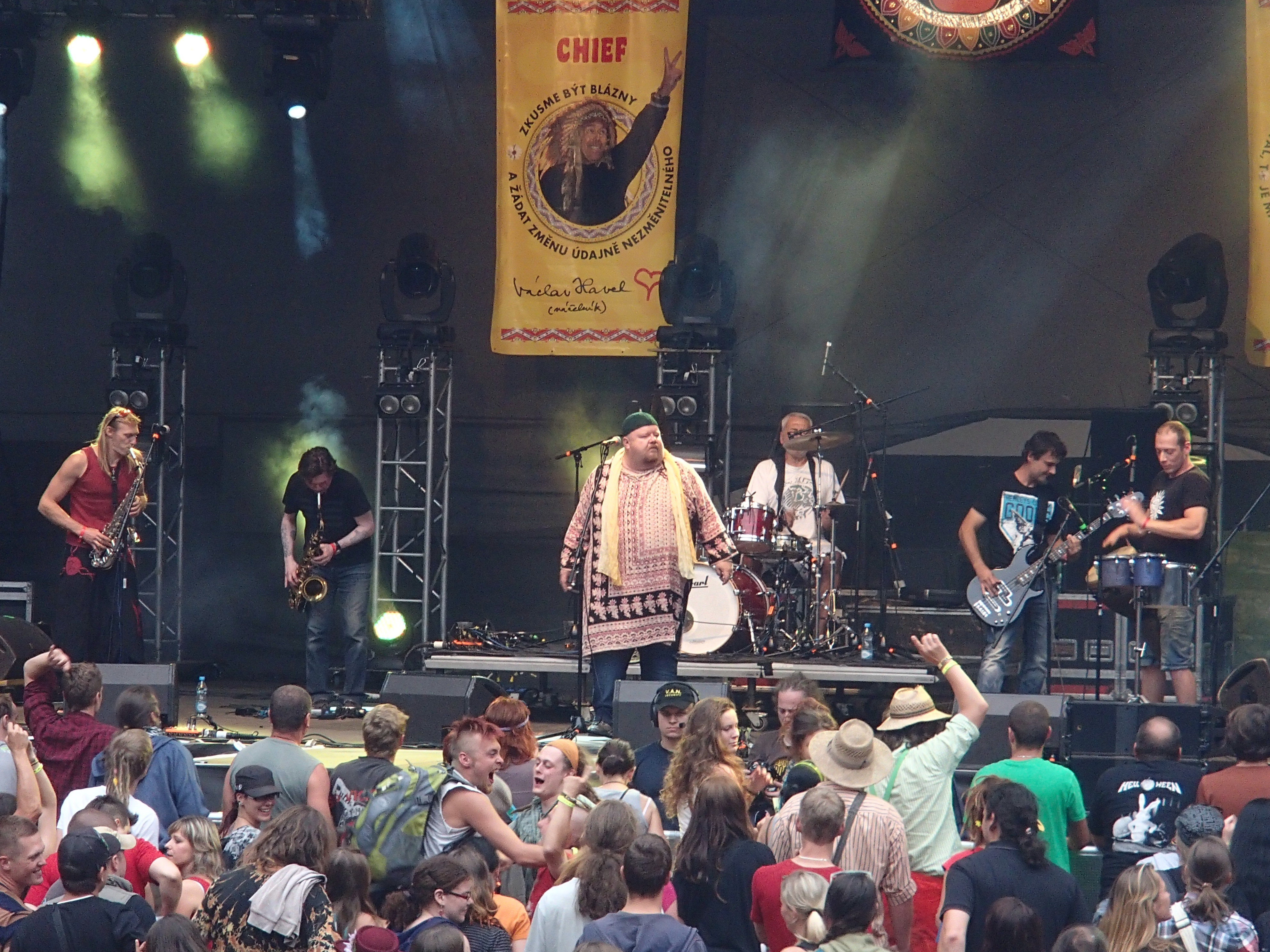 Čankišou na Trutnov Open Air Music Festival 2012